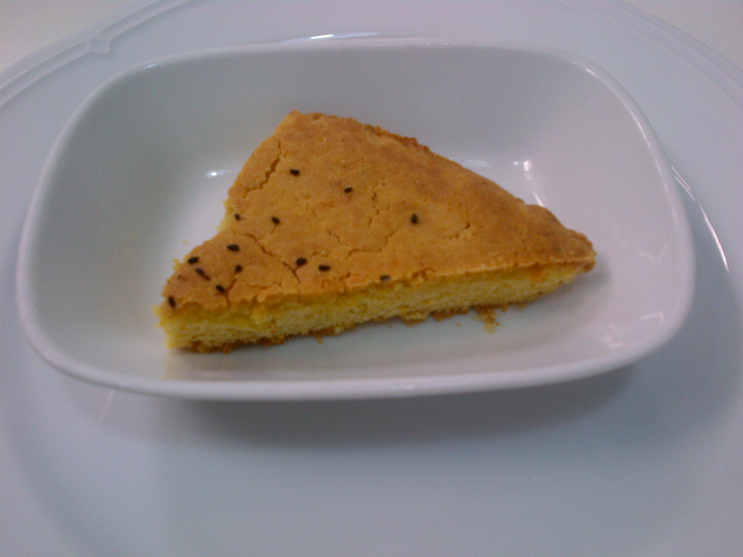 "Mısır ekmeği" o "pan de choclo (maiz)" de la Region del Mar Negro de Turquia.